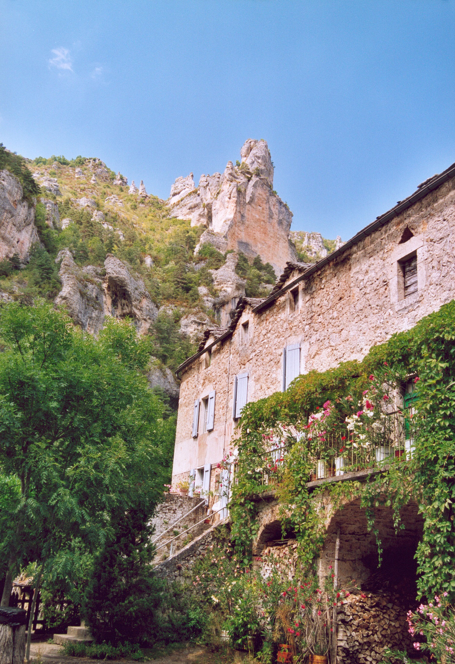 France Lozere Saint-Hilaire-de-Lavit Photographie prise par GIRAUD Patrick Août 2005